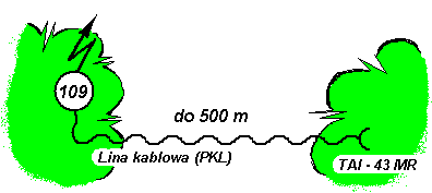 Fernwirk-Betrieb - über leichtes Feldfenkabel LFK-9 bis 500m – einer abgesetzten Funkstellen R-109, in der Betriebsart Fernbedienung.